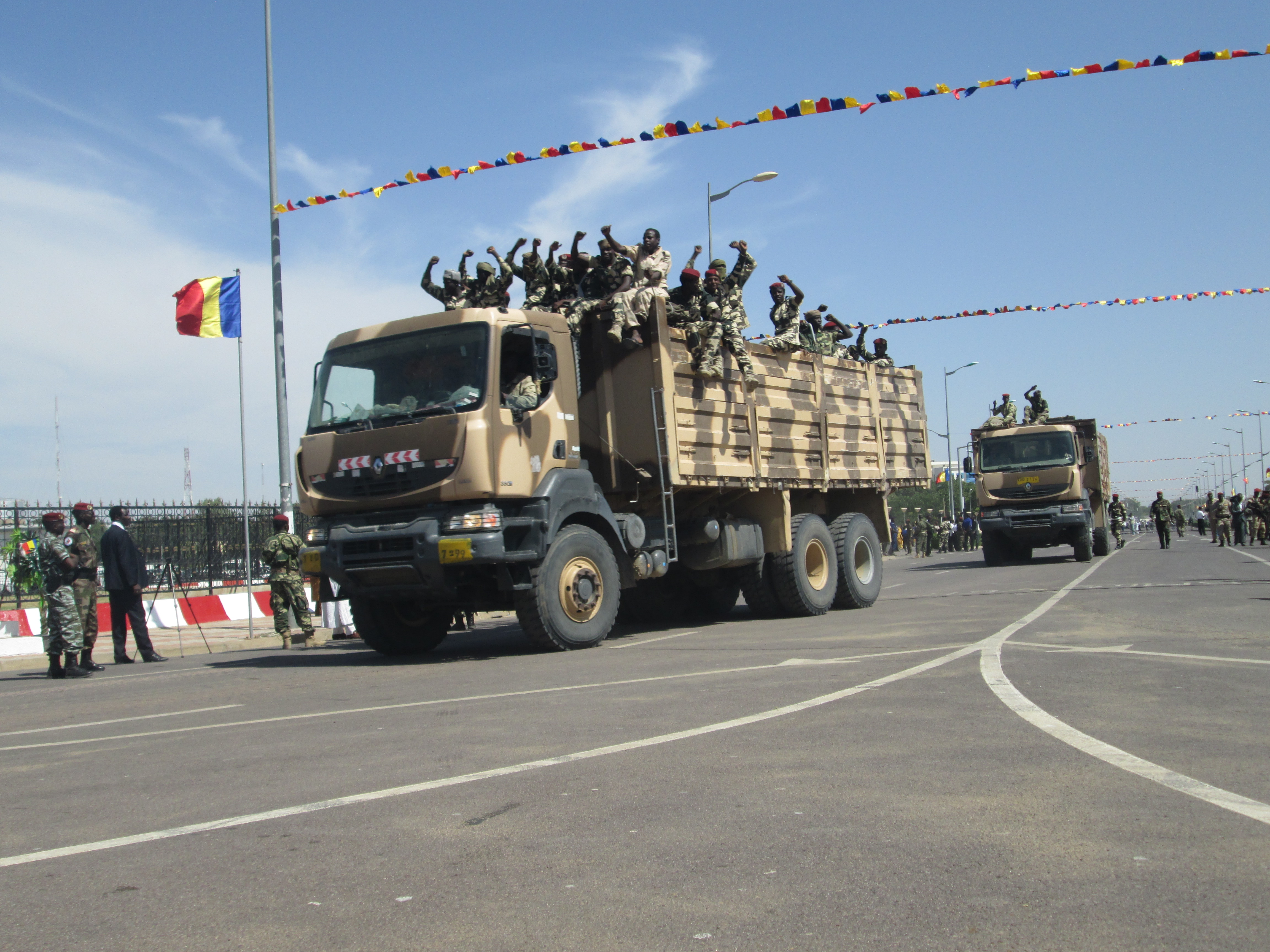 Les forces armées tchadiennes, à N'Djamena, le 13 avril 2020 après la fin de l’opération "Colère de Boma". (VOA/André Kodmadjingar).